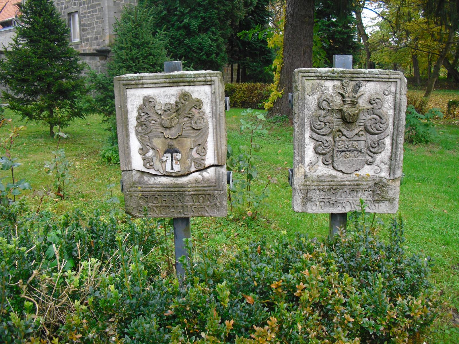 Wappensteine von Johann von Münchhausen und seiner Frau Wilhelmine Osterhelt von der Wense, 1655